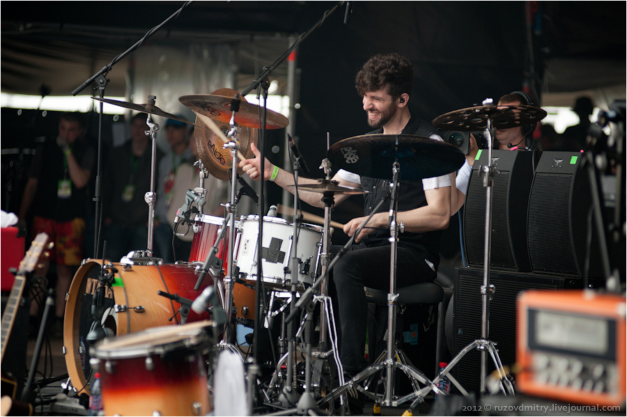 Борис Лифшиц, группа Би-2, фестиваль Рок над Волгой 2012